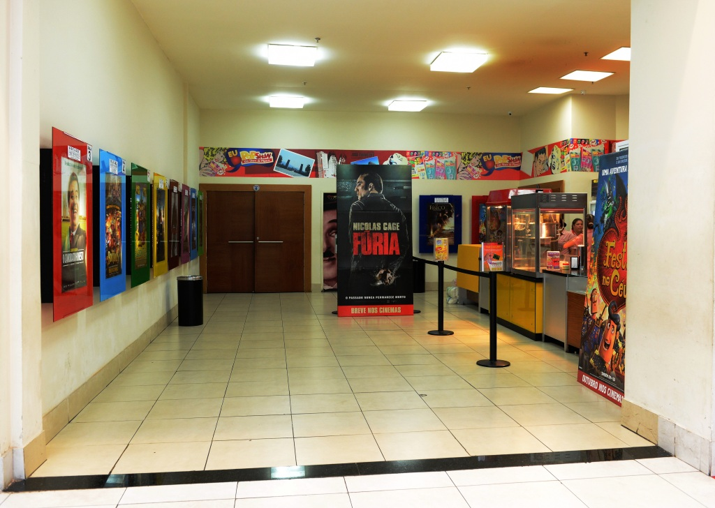 Bomboniére do complexo Rede Cine Show da cidade de Volta Redonda, Rio de Janeiro